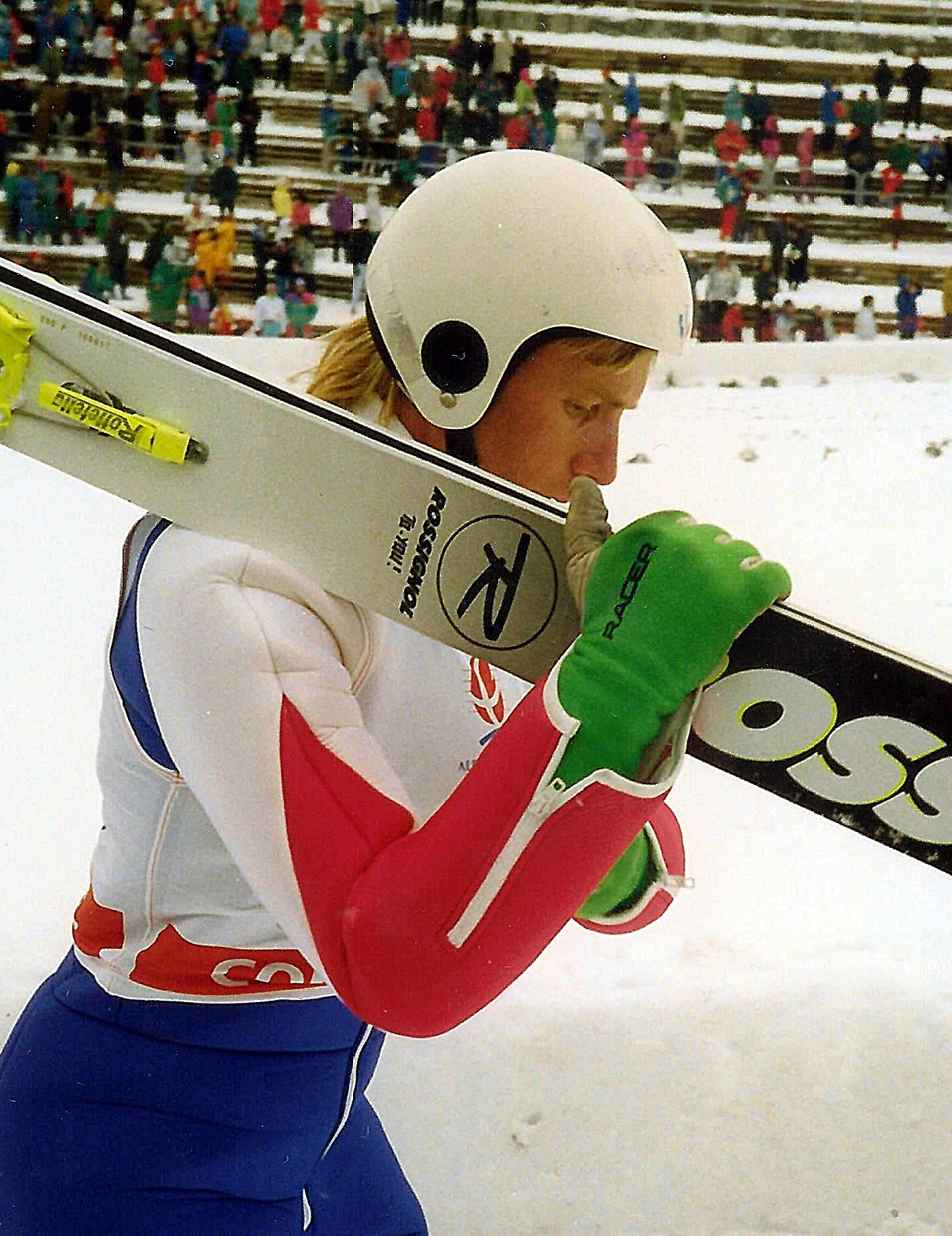 Sylvain Guillaume lors des J.O. d'Alberville, le 17 février 1992.